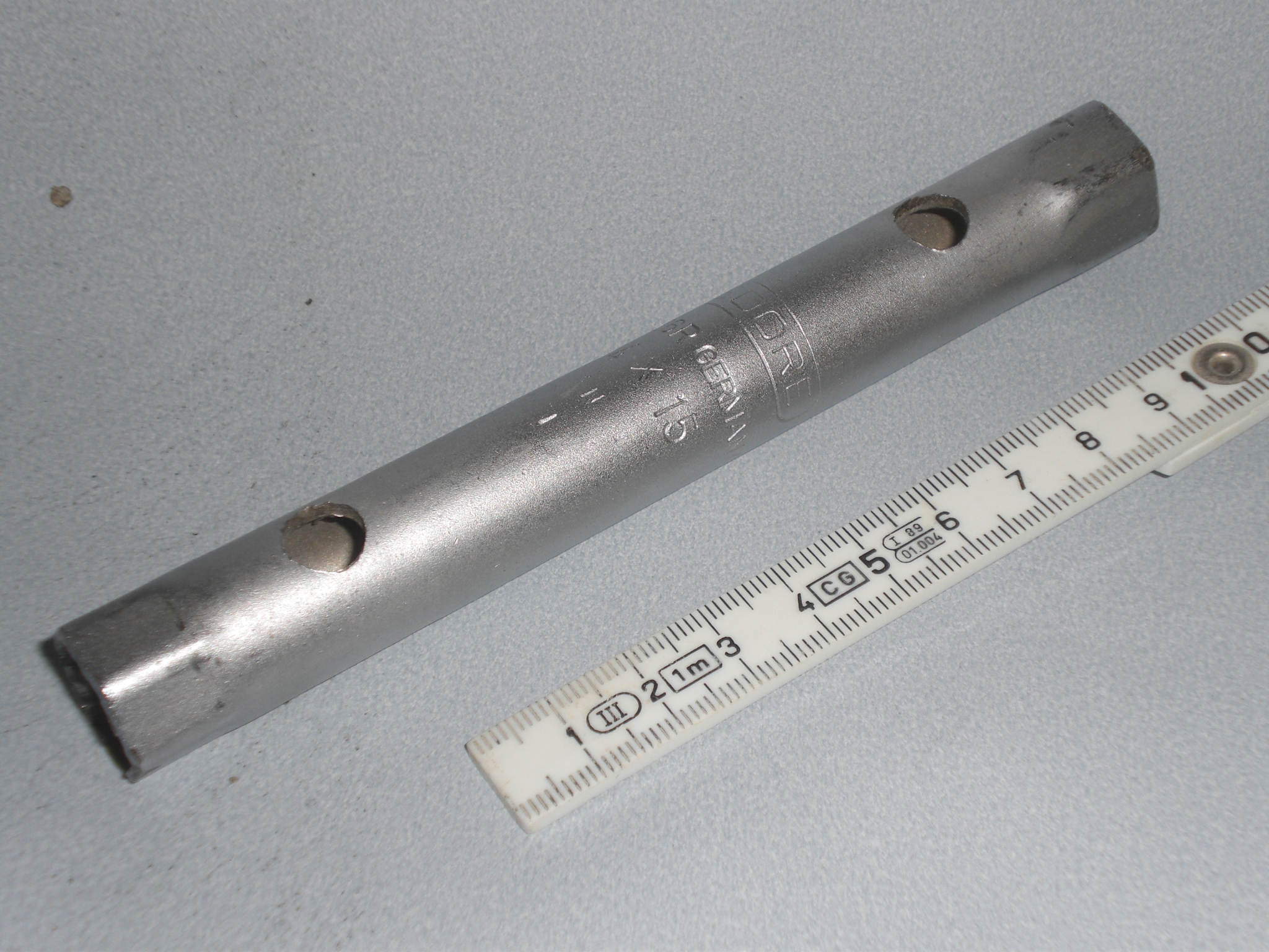 ein Rohrschluessel aus meinem Werkzeugkasten (Zollstock als Massstab)